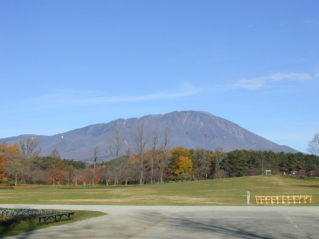 Iwate volcano